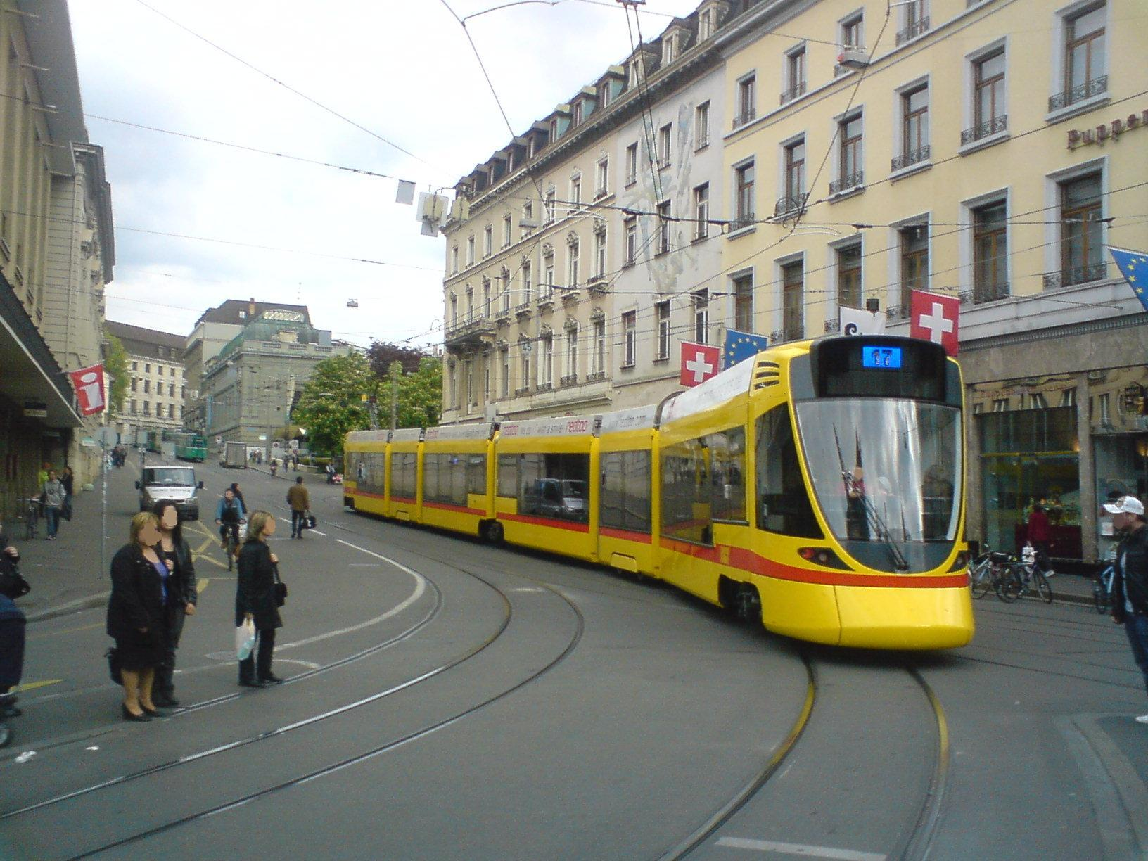 Tram Tango BLT de la ligne 17 allant vers Ettingen à Barfüsserplatz (Place des pieds-nus). C'est le premier jour de sa mise en service.